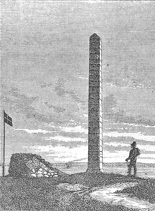 Stenstøtten på Skamlingsbanken mellem Kolding og Christiansfeld i det tidligere mellem Kolding og Christiansfeld Vejle Amt, Denmark